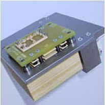 MCA-IL Inlineadapter